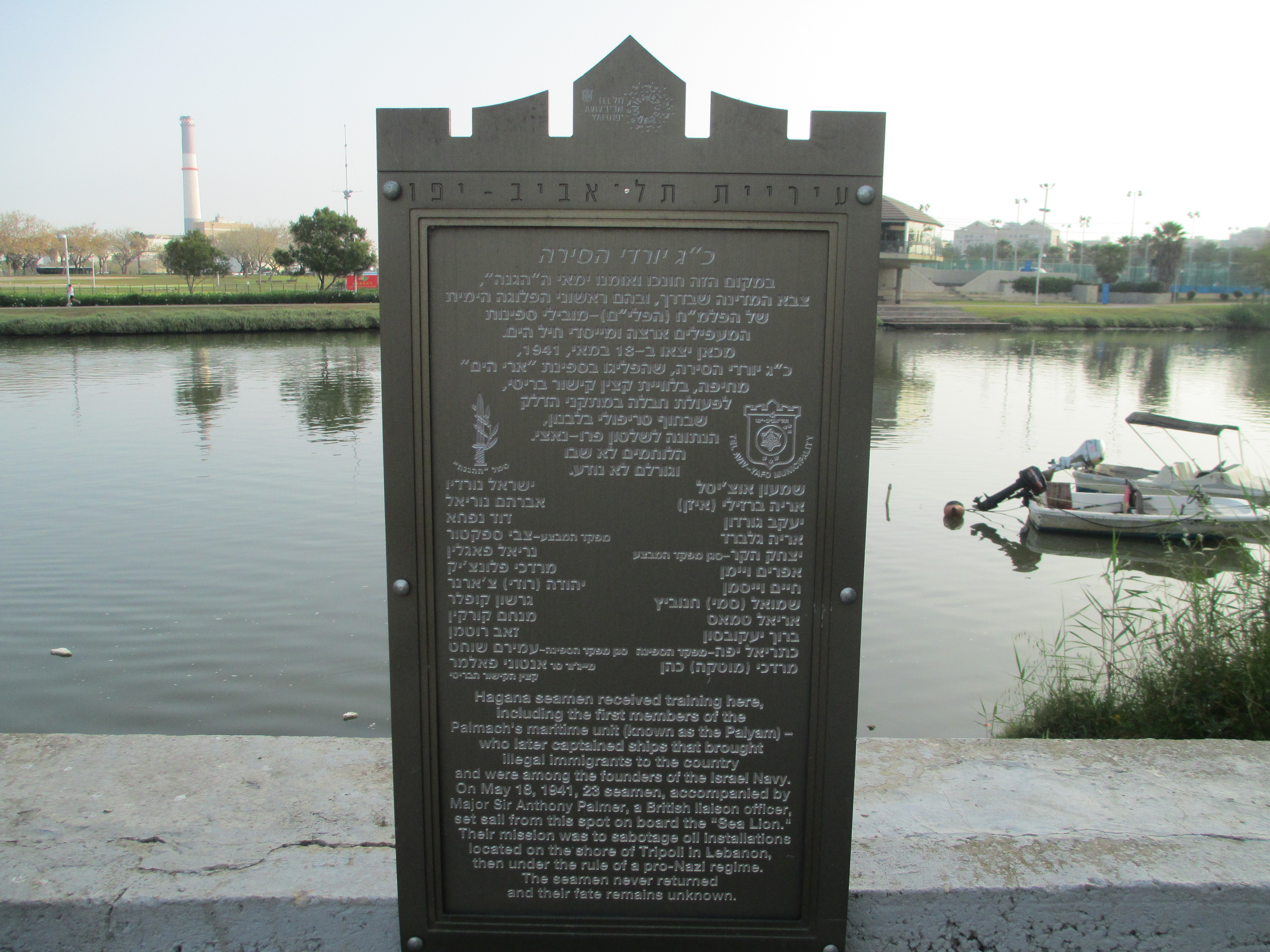 לוחית זיכרון לכ"ג יורדי הסירה בטיילת אוסישקין בתל אביב